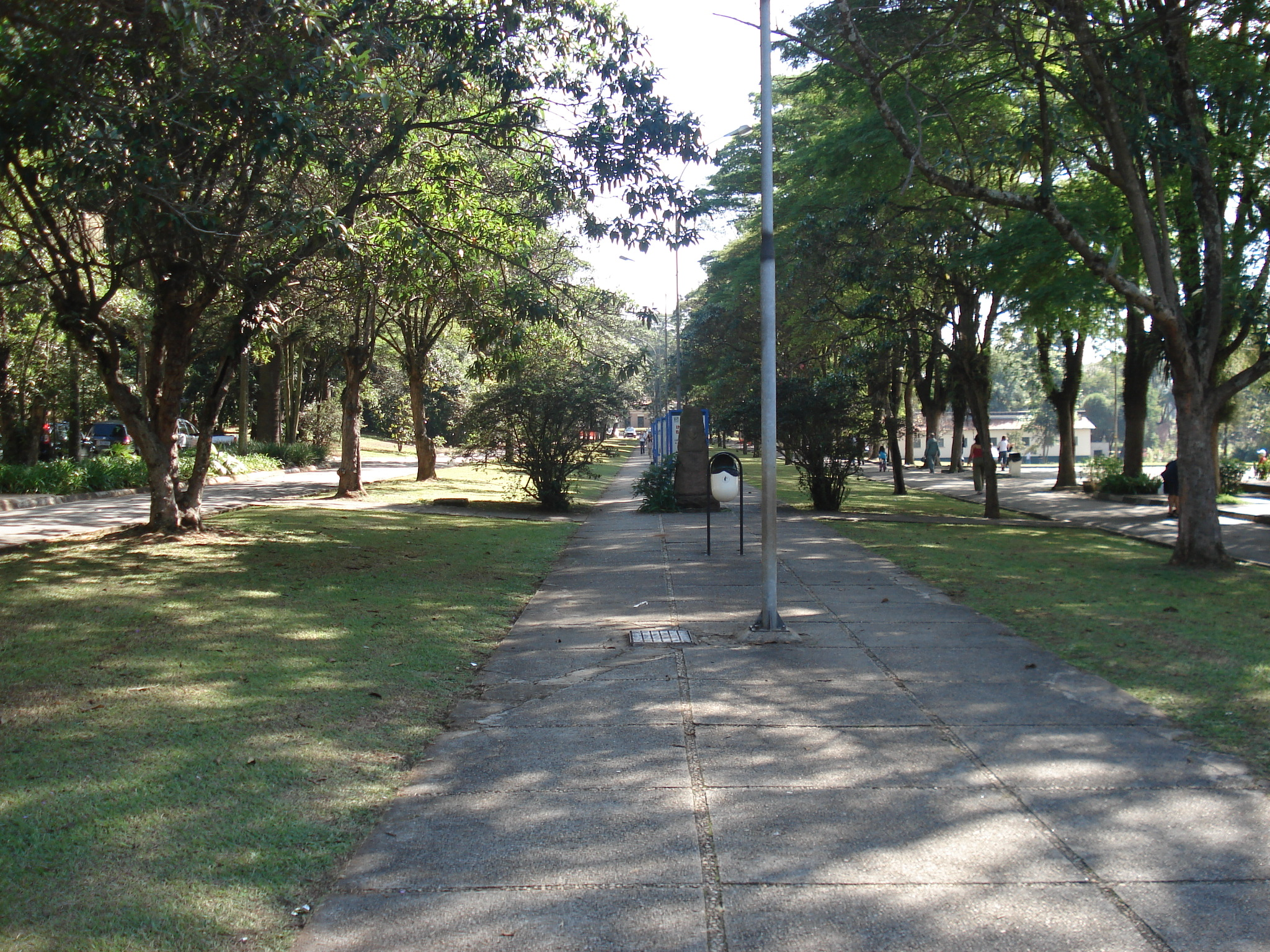 Instituto Butantã em São Paulo, SP.